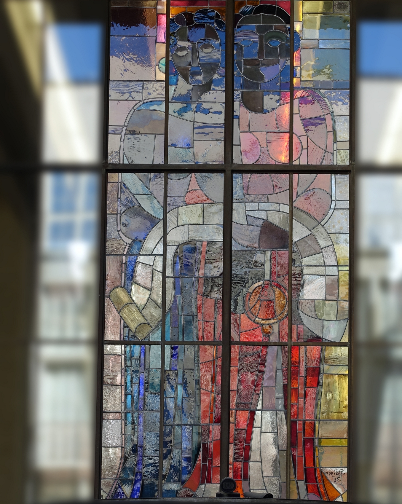 Kunstmuseum Basel. 1936, Glasmalerei von Charles Hindenlang (1894–1960) und Otto Staiger (1894-1967)